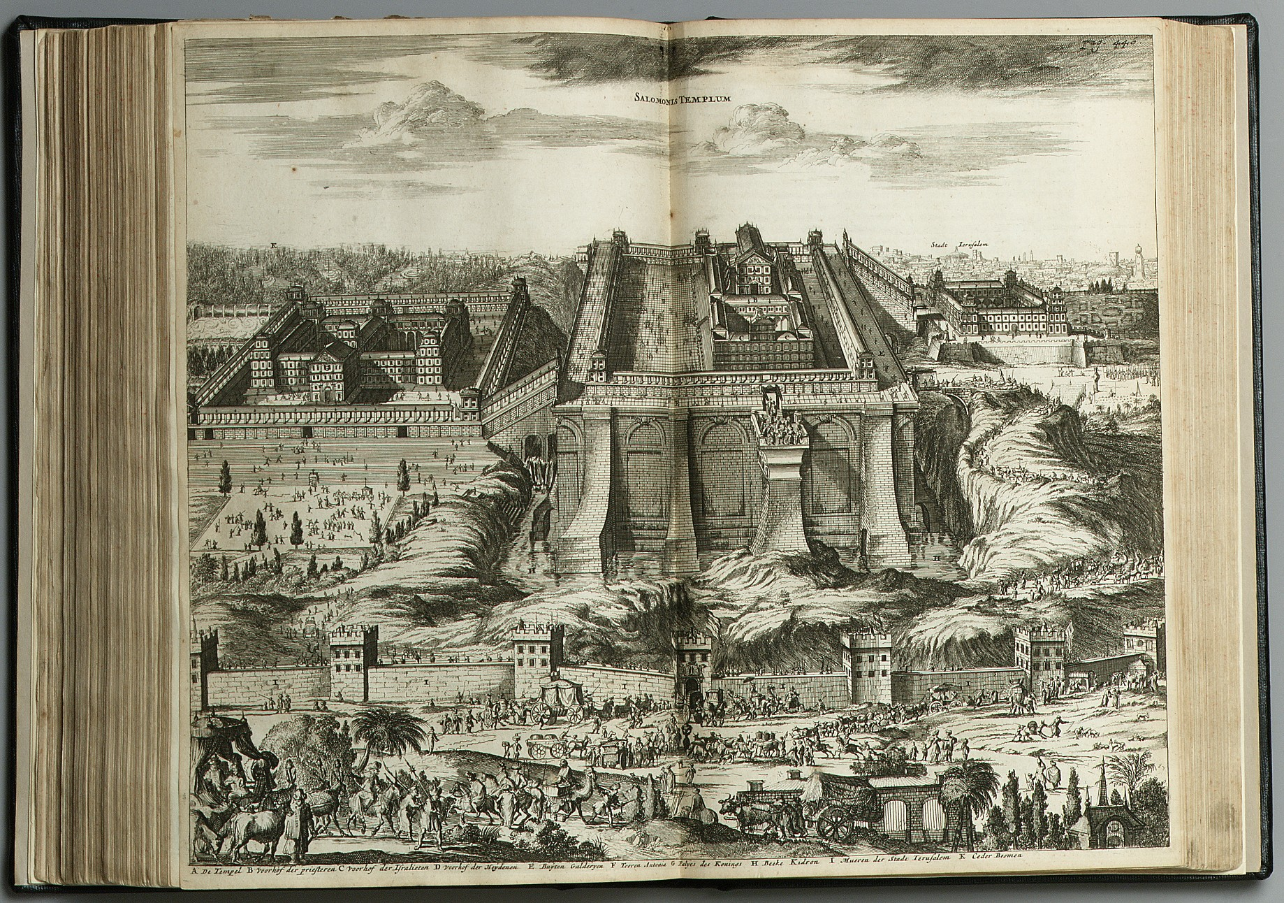 Amsterdam : Jacob von Meursen, 1681